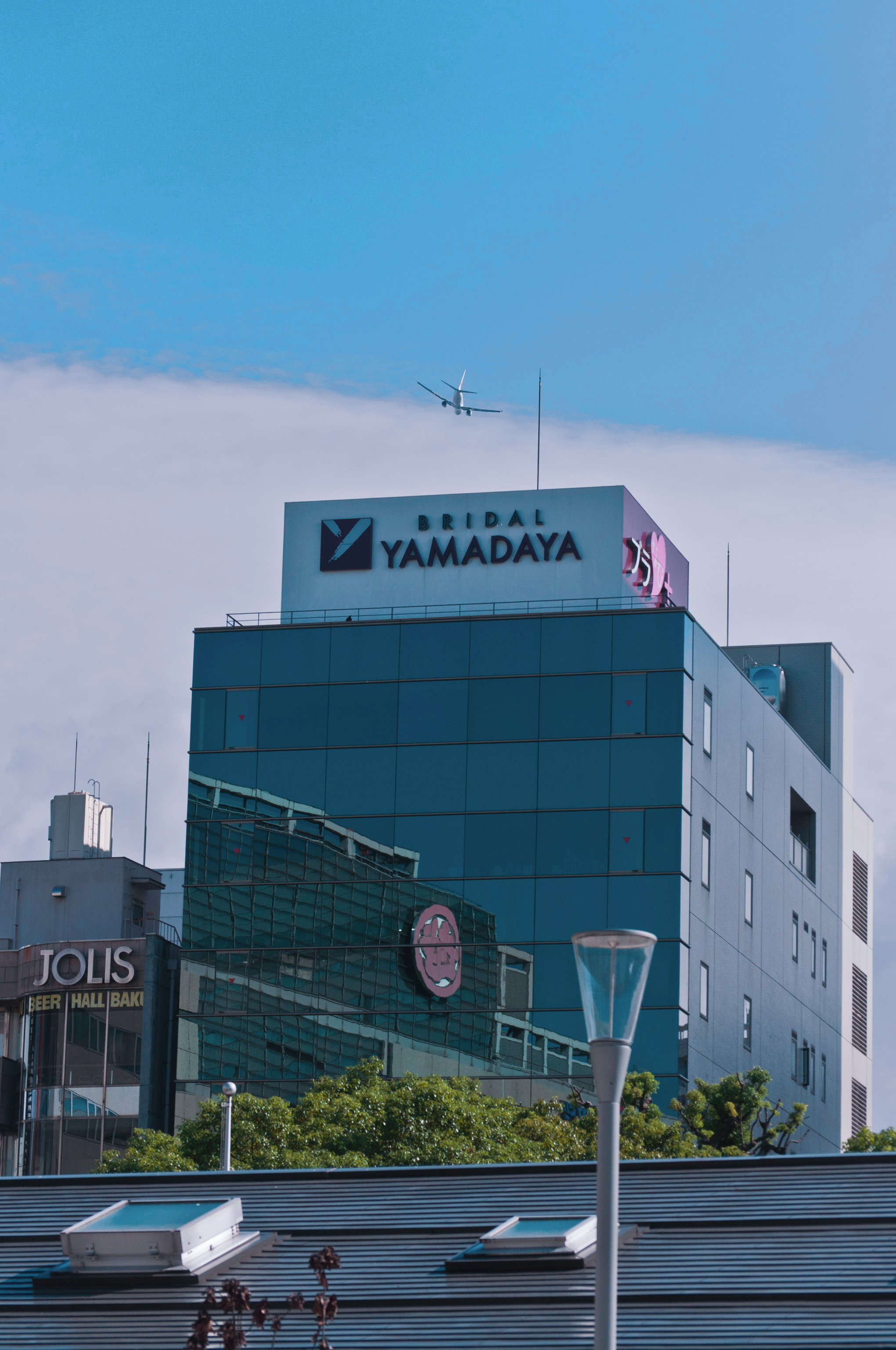 天神の市街地上空を通過しながら福岡空港に進入中の航空機。